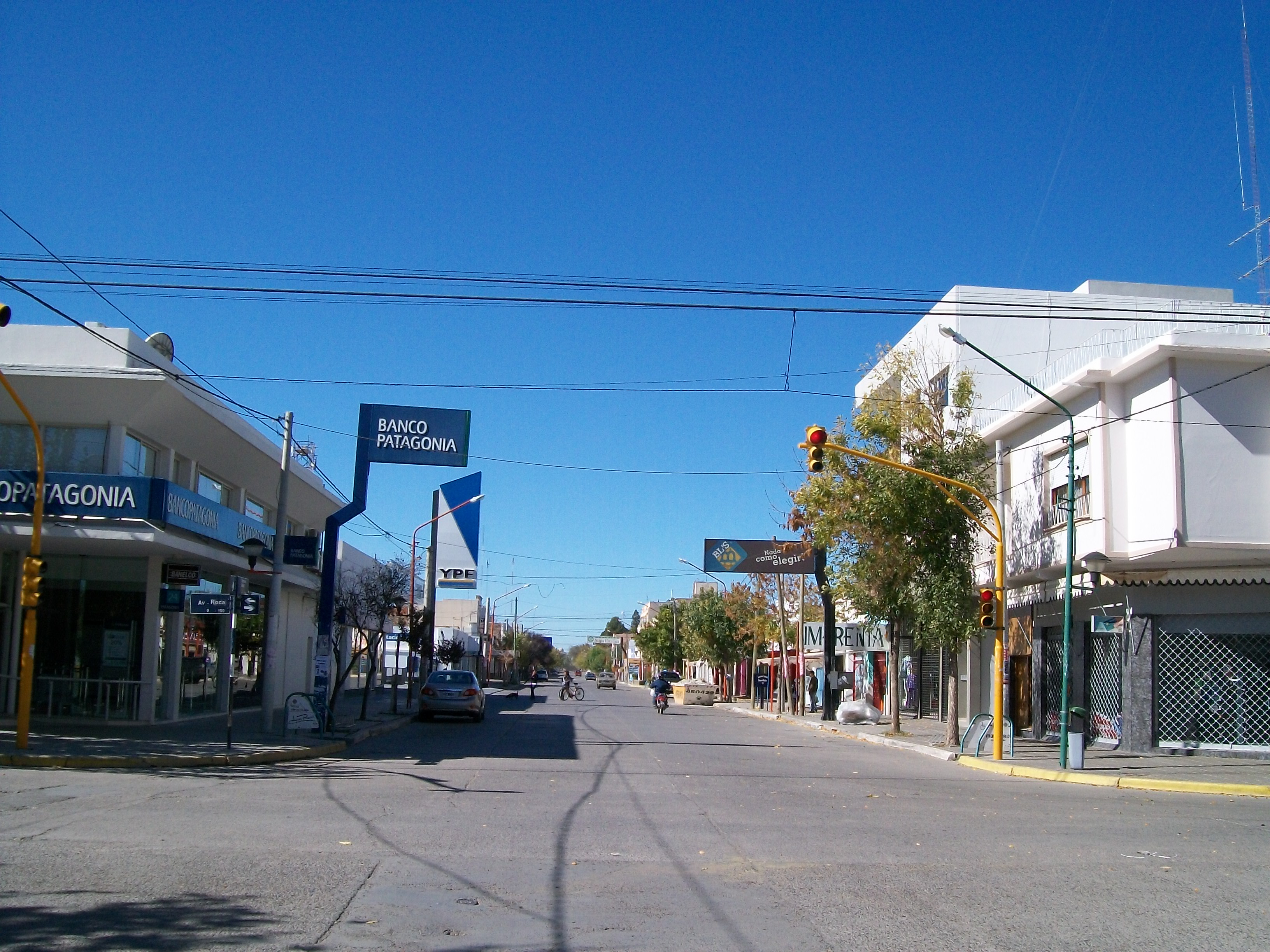 Calle Tomas Orell desde su nacimiento en la avenida Gral Roca. Centro comercial de la localidad de Allen, provincia de Río Negro, Argentina